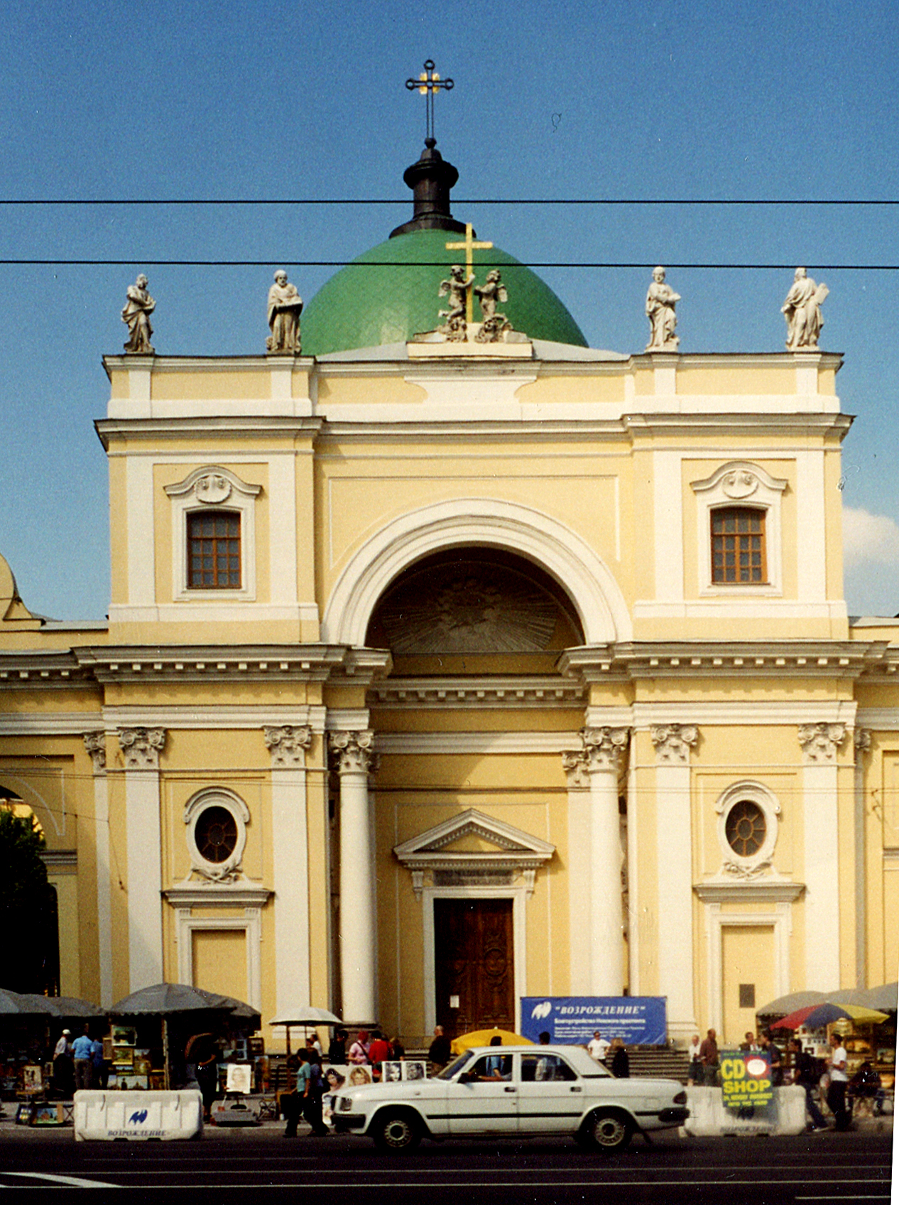 Костёл св.Станислава